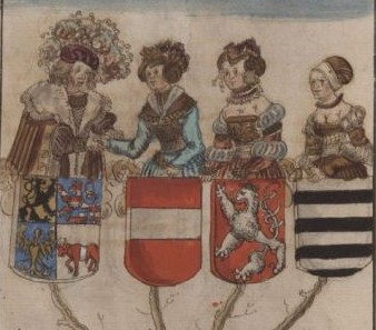 Jindřich Jasný a jeho tři manželky